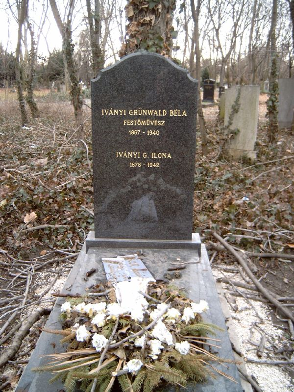 Iványi Grünwald Béla sírja Budapesten. Kerepesi temető: 41/1-1-73.